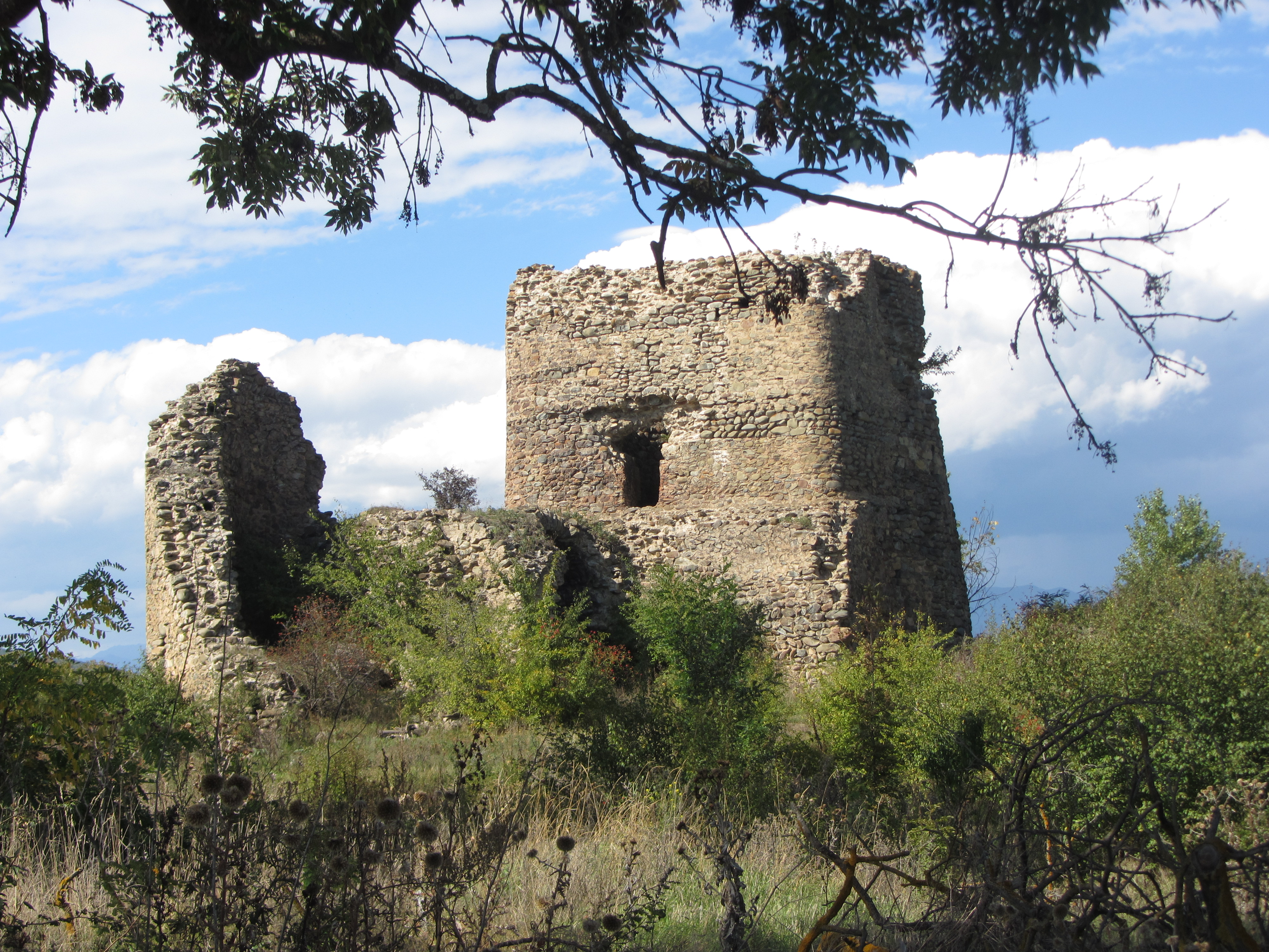 აჩაბეთის ციხე